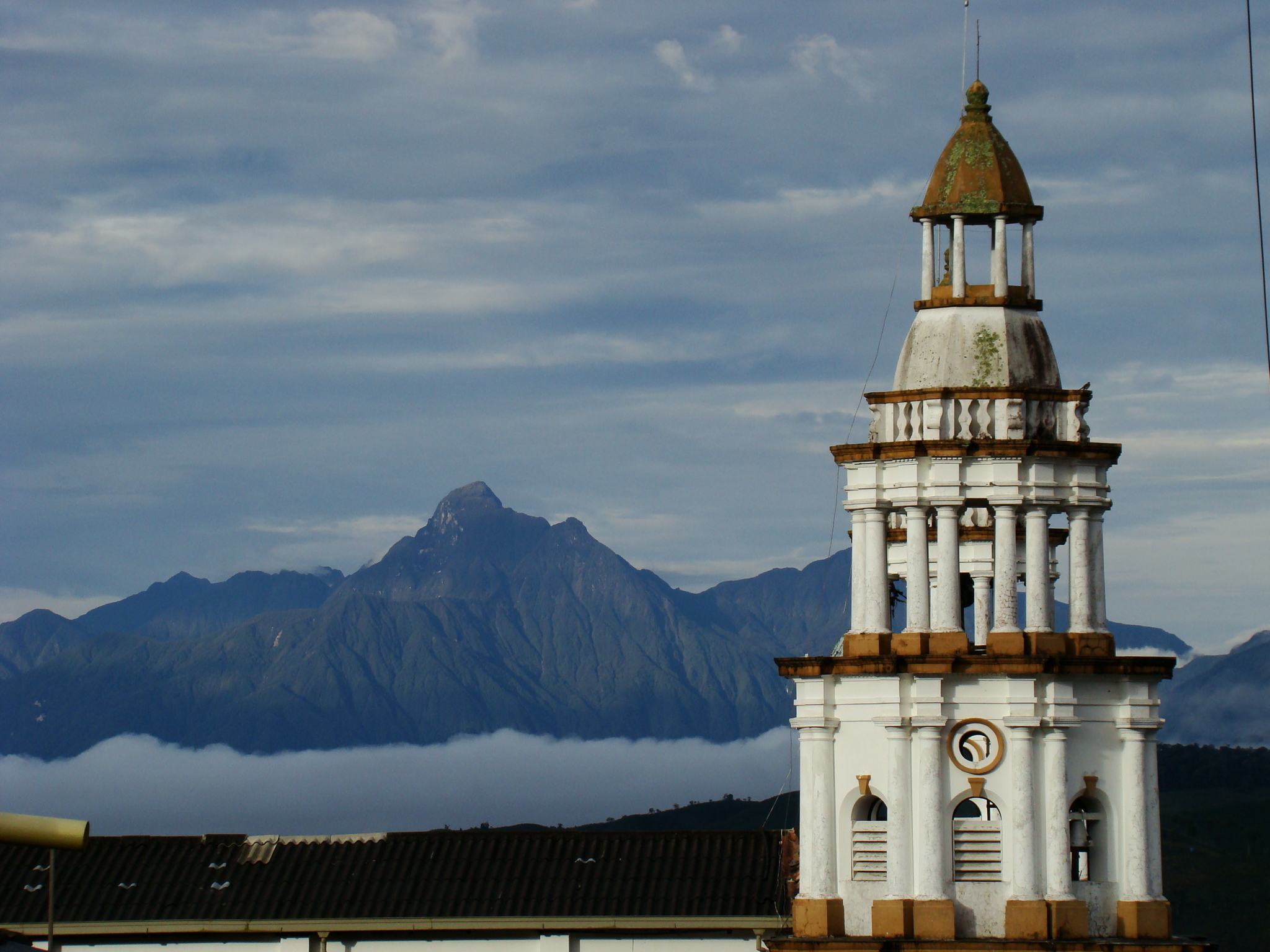 Torre derecha de la iglesia del municipio de Concordia (Antioquia); tras esta se aprecia la otra torre. Al fondo, estribaciones de la Cordillera Occidental|.